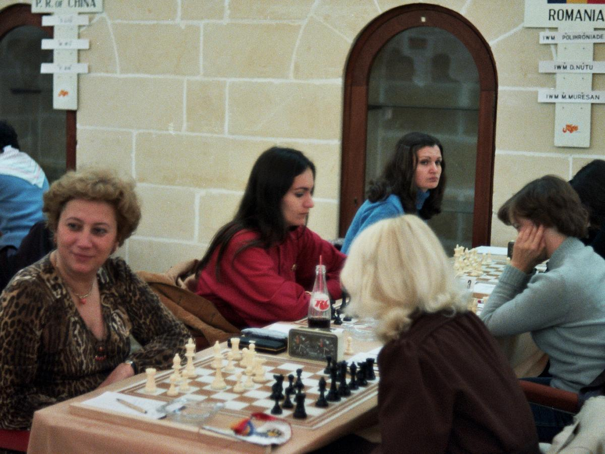 Schacholympiade 1980 in Valetta auf Malta: Rumänien - Polen. Von links nach rechts: Elisabeta Polihroniade, Daniela Nutu, Margareta Muresan. Fotografiert von Gerhard Hund im November 1980 in Valetta.